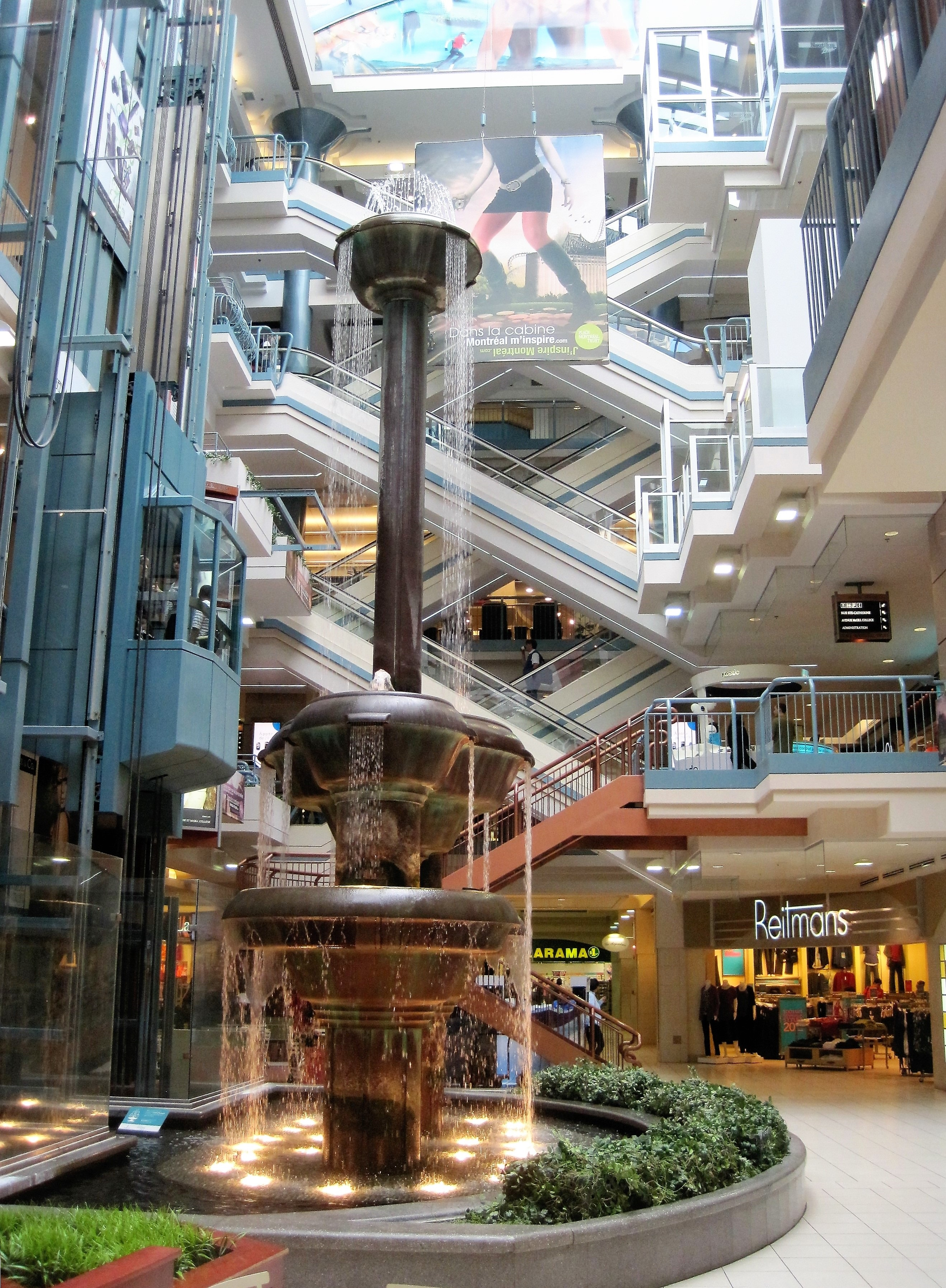 Fontaine de cuivre de la Place Montreal Trust, la plus haute fontaine intérieure en Amérique du Nord